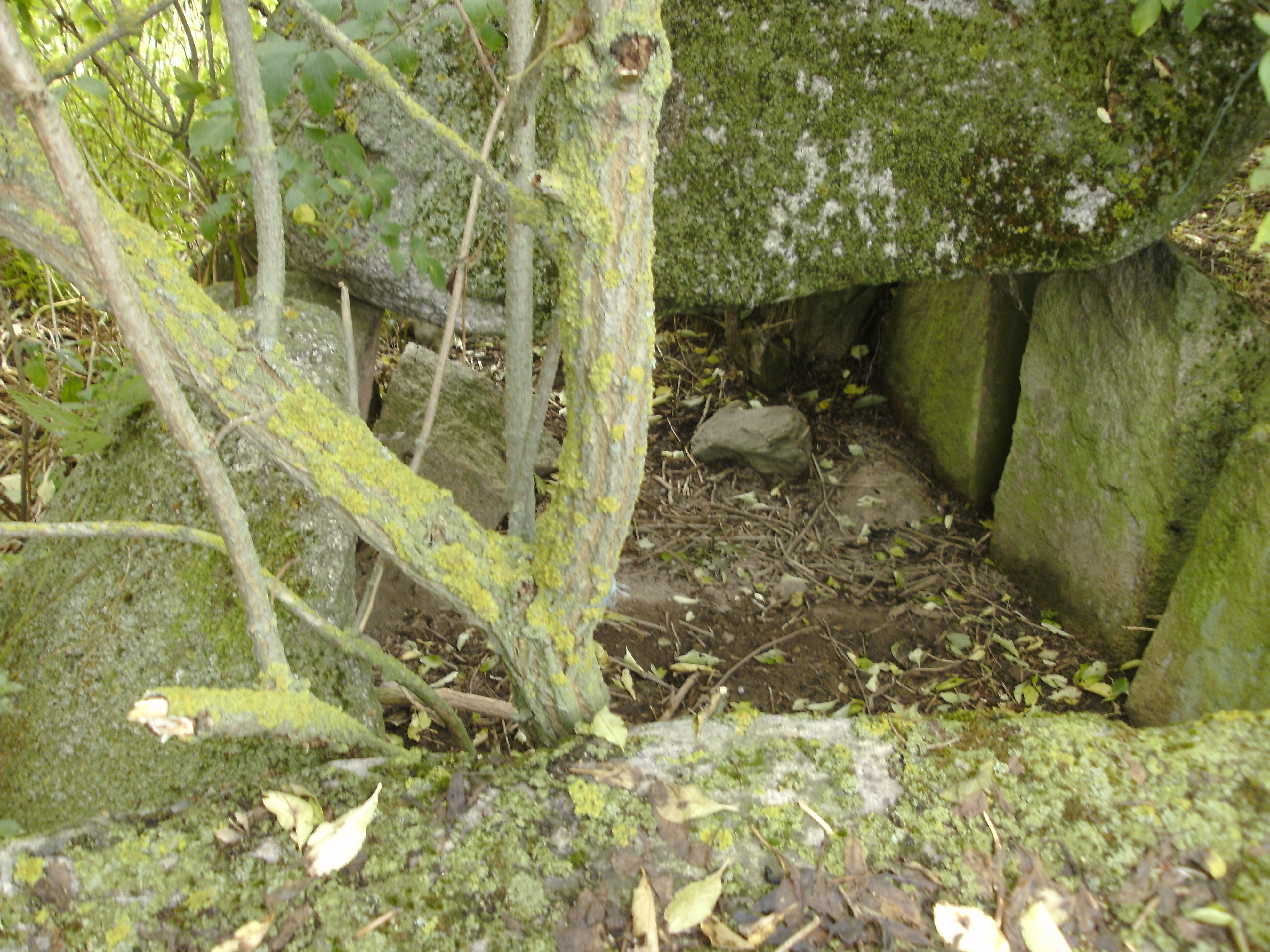 Hünengrab Groß Zastrow